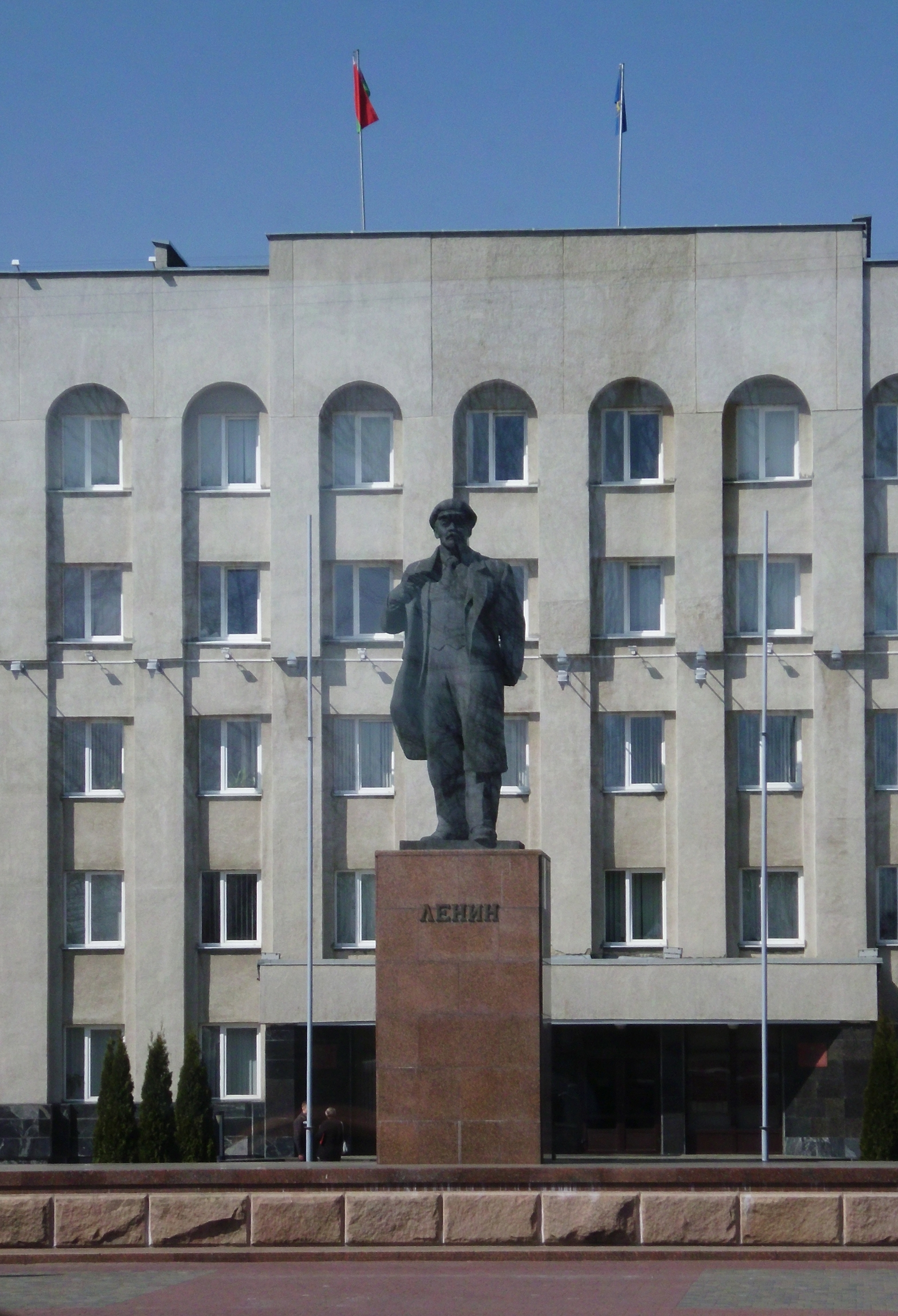 April 2013 Grodno